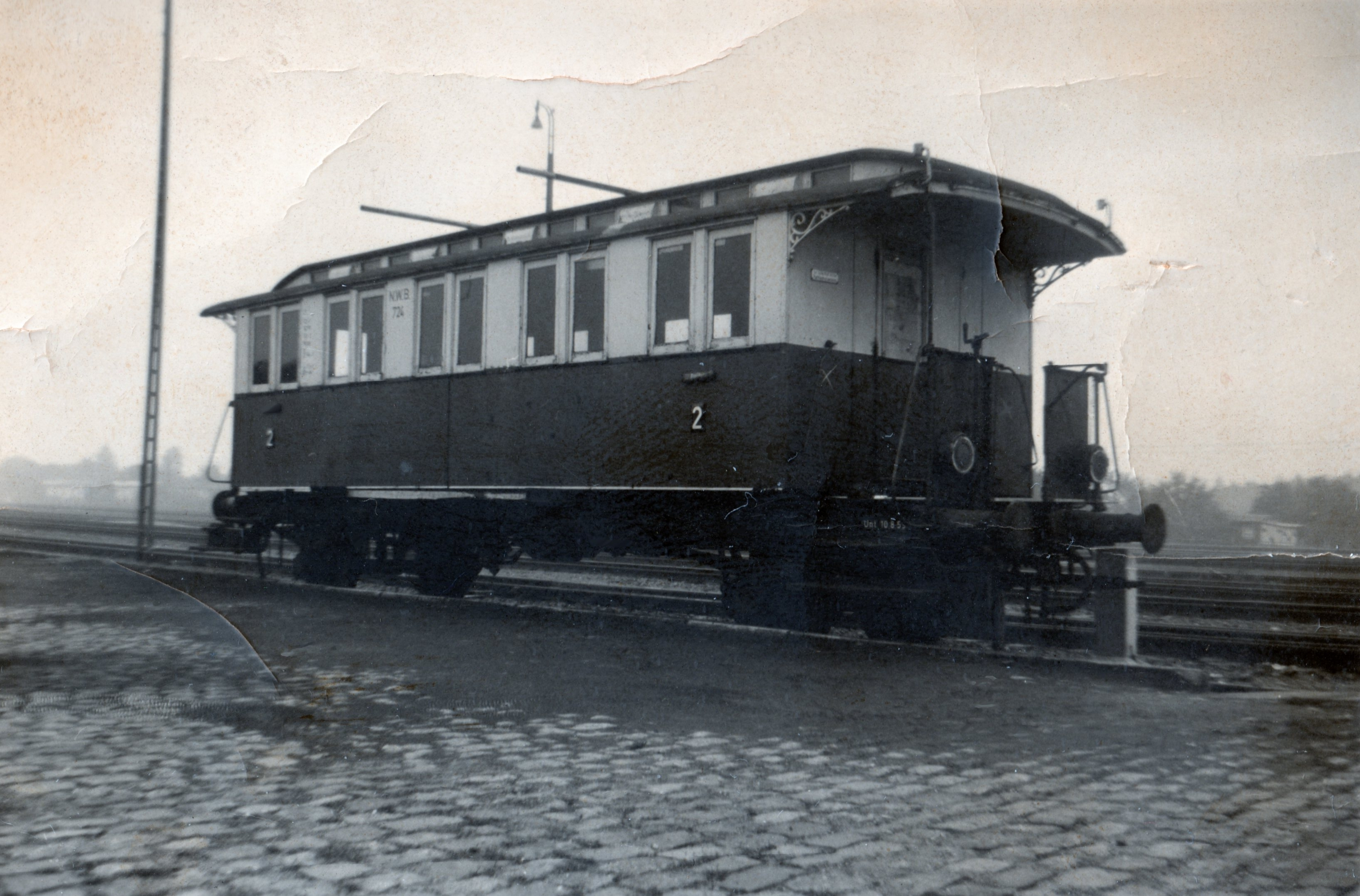 Waggon 2.Klasse Bj 1912 WMD Donauwörth, Länge ca. 8m, Breite ca.3m.2 Abteile 5 zu 3 m, Holzbänke, Konvektoren-Dampfheizung unter den Bänken, Festbrennstoff-Ofen waggonmittig im größeren Abteil. Abteile mit rot/weiß emaillierten Klappschildern 'Raucher' (rot)/ 'Nichtraucher'(weiß) ausgestattet. Doppel-Sitzbänke beidseits, Holzleisten, mit Überkopf-Gepäckgestell. Lackierung in den Farben der N.W.B. (oben gelbweiß, unten rot). Aufbaudach mit Dachpappe, in Längsachse Entlüfterhauben sowie 1 Kaminrohr.